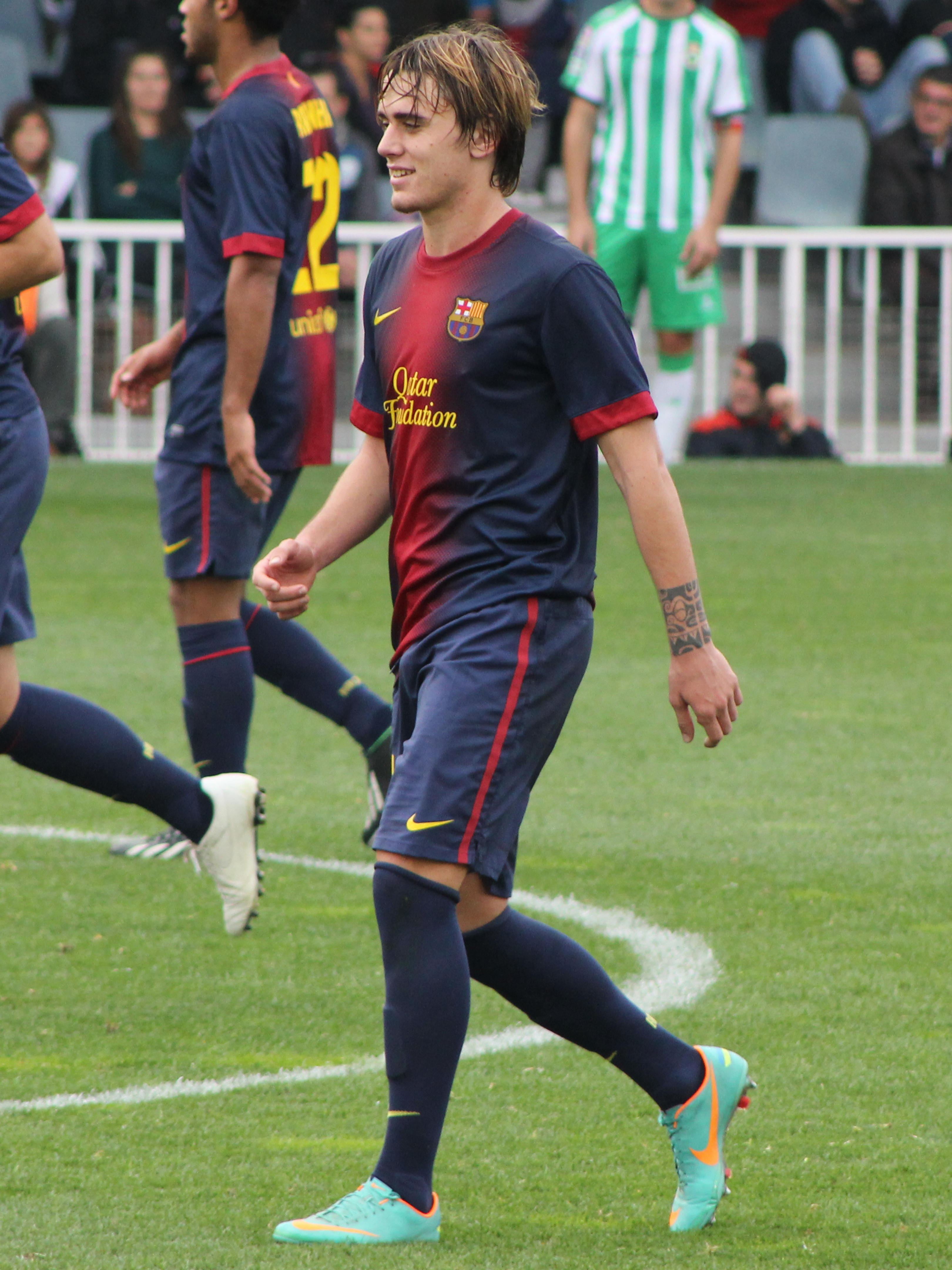 Jugador del FCB B en la temporada 2012-2013